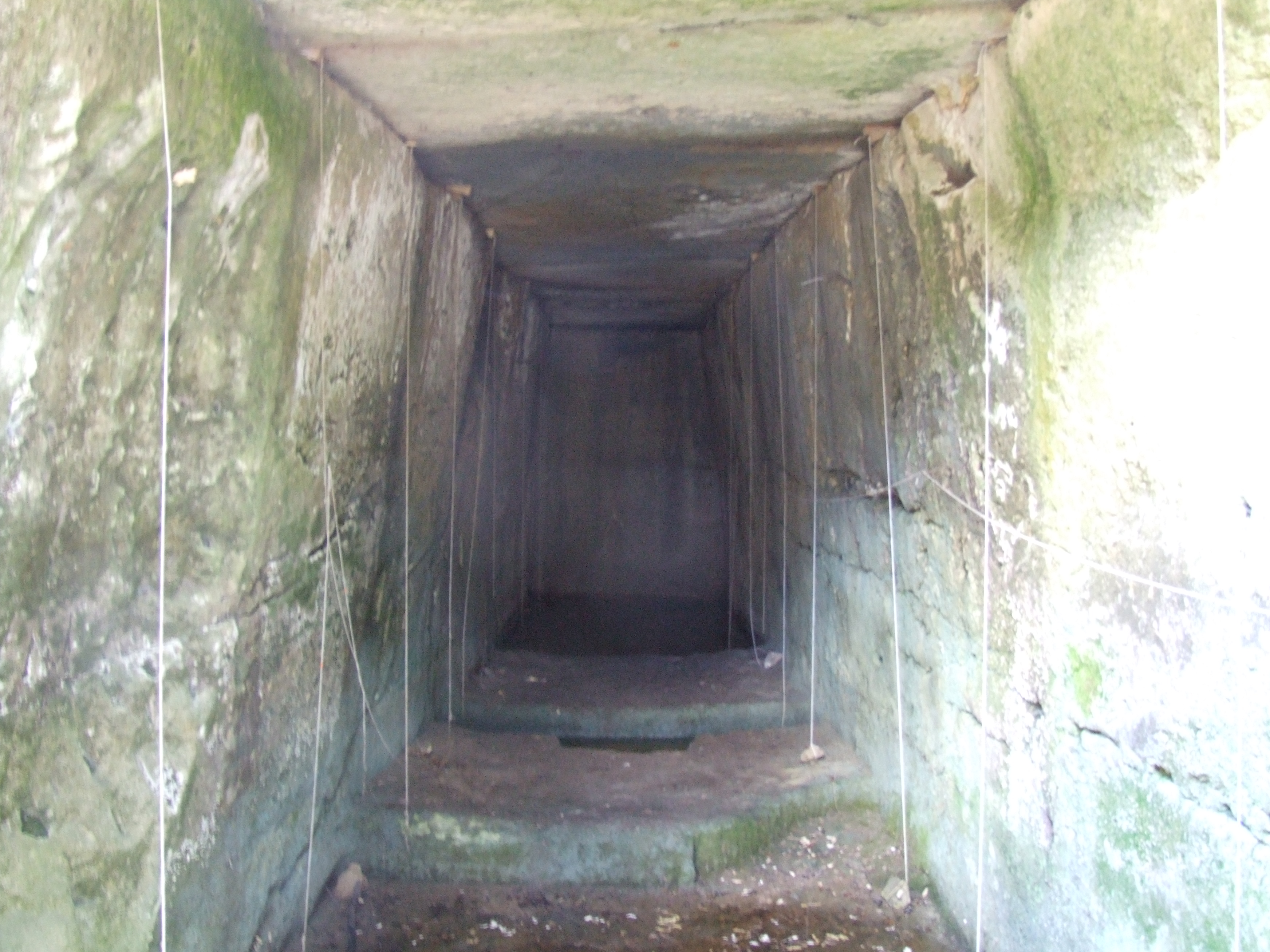 Salle souterraine de l'hypogée du Castelet à Fontvieille, Bouches-du-Rhône